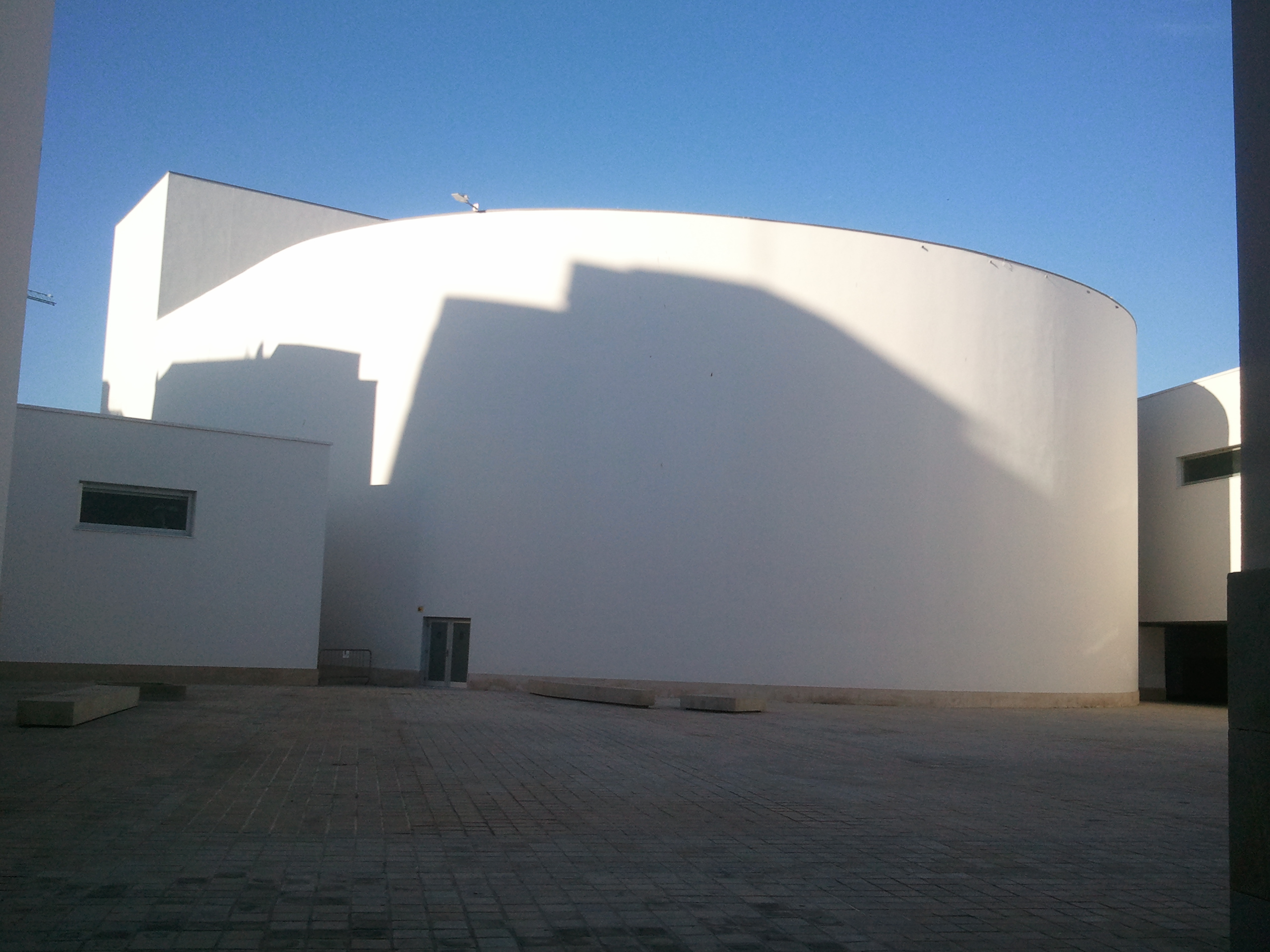 Auditorio Manzana del Revellín, Ceuta, España, de Álvaro Siza.